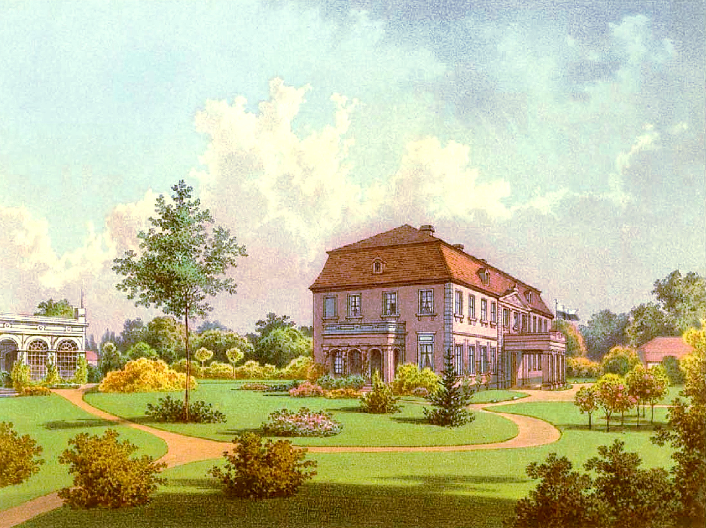 Rittergut Briesen, Spreewald, Kreis Cottbus, Provinz Brandenburg